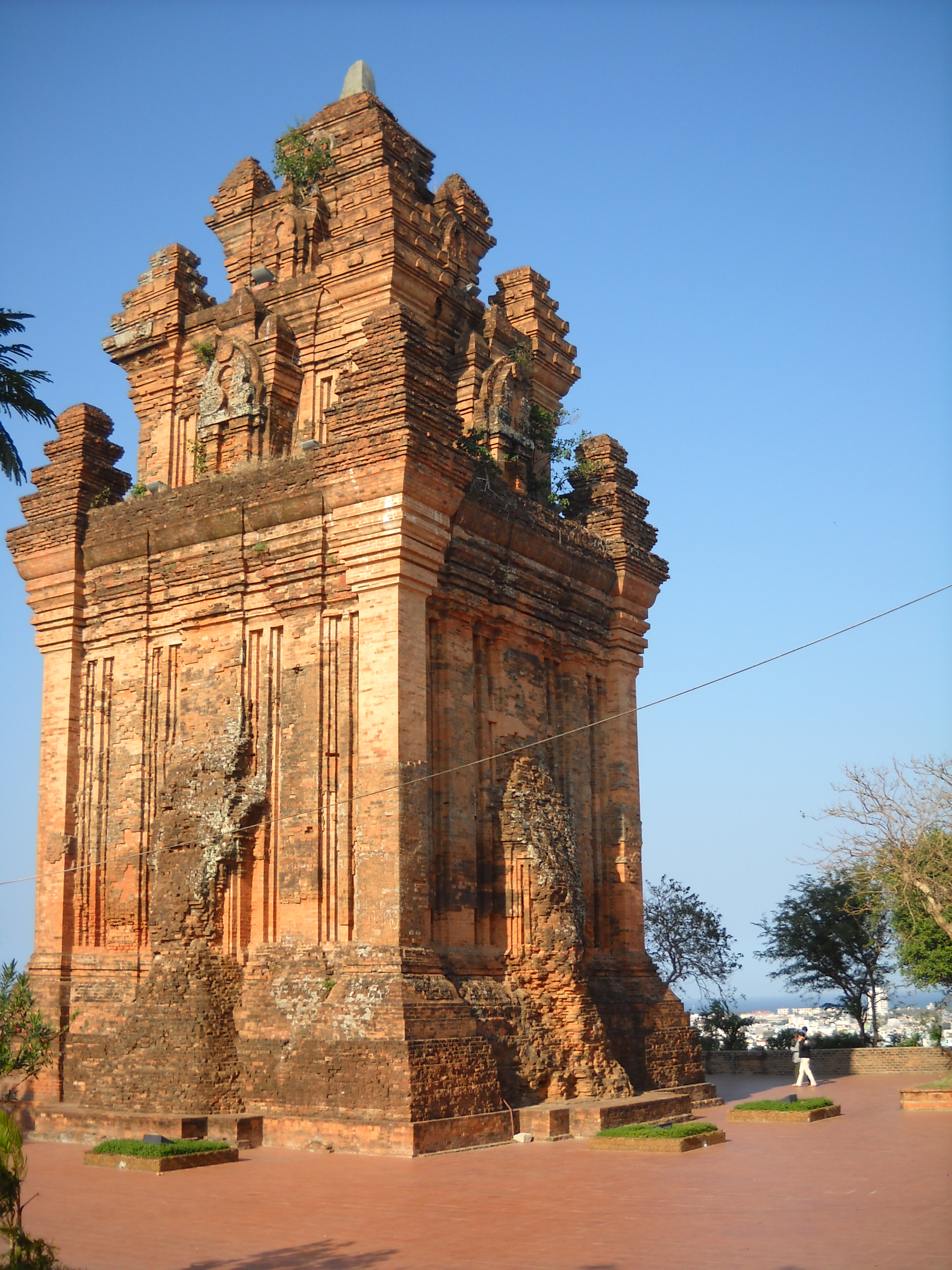 The Cham tower Nhan in Tuy Hoa, Phu Yen, Vietnam